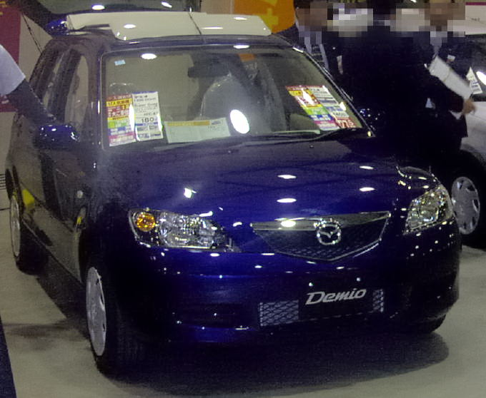 Mazda Demio 2nd generation(マツダ・デミオ),Hiroshima Sangyo kaikan